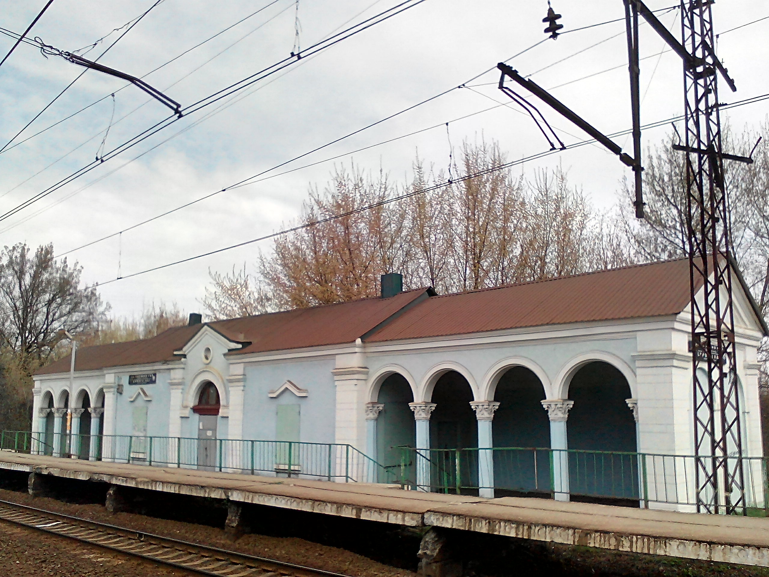 Приміщення вокзалу залізничної станції Липовий гай. Харків. Україна